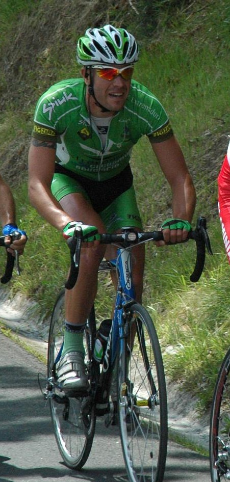 Enrique Salgueiro Euskal Bizikleta 2008, 3rd stage.